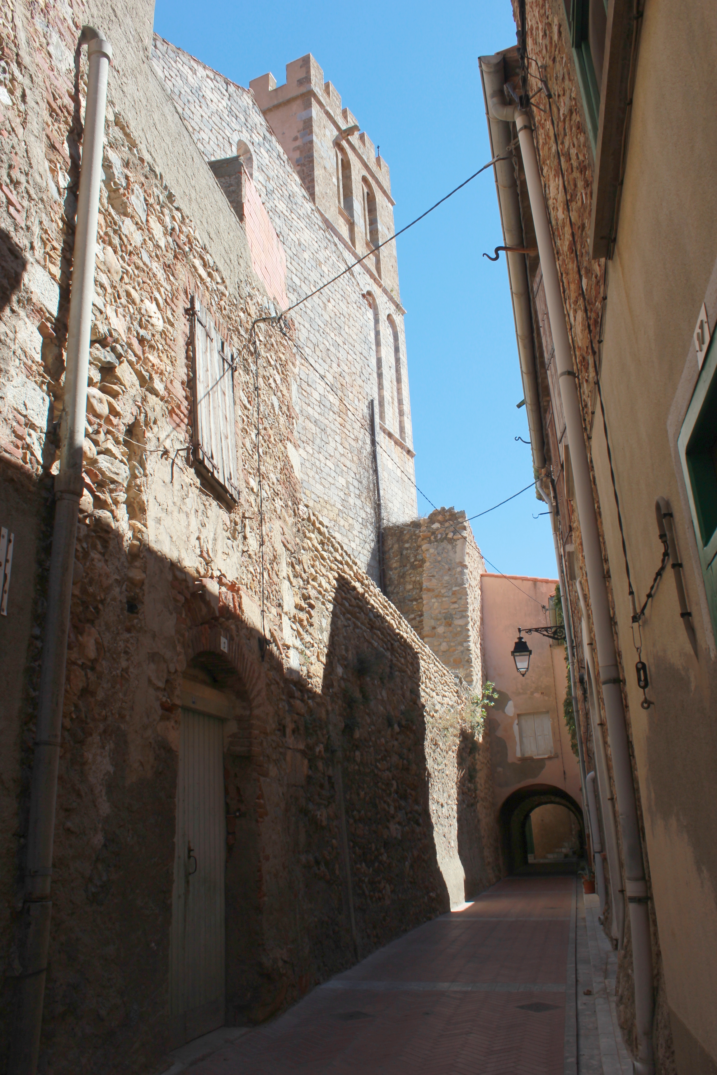 Baixas (66), ruelle du village